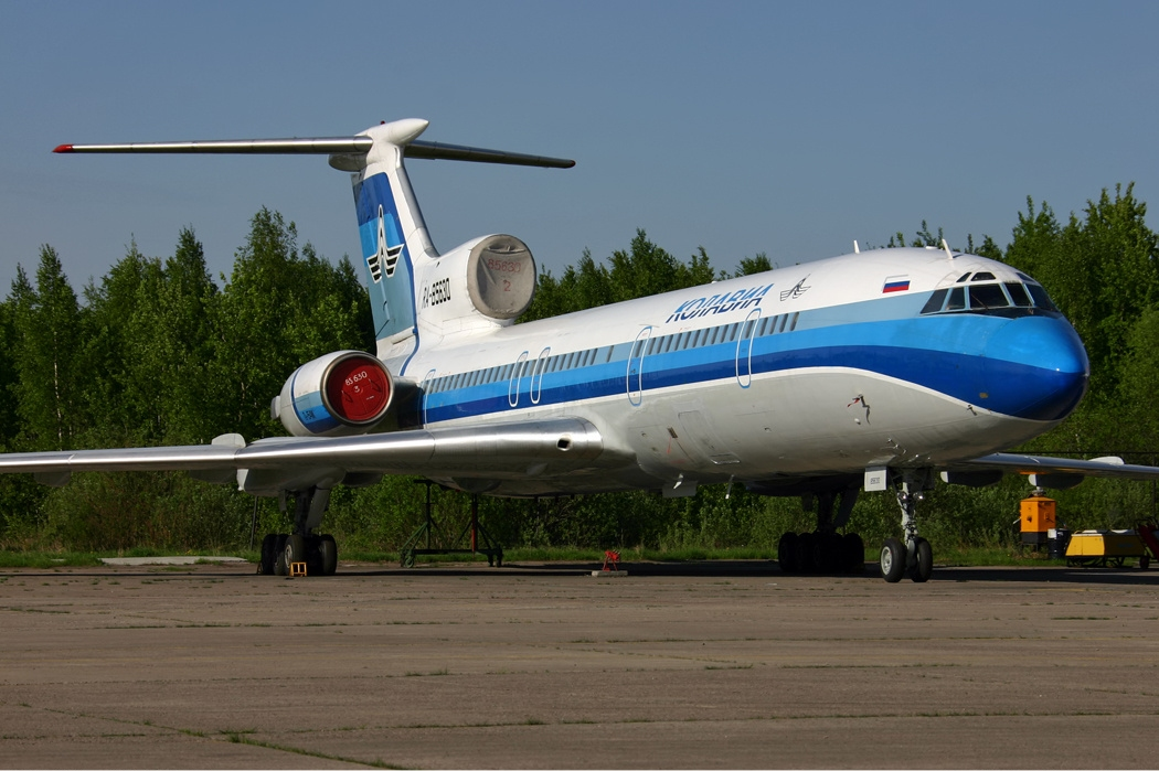 RA-85630, Kolavia Tupolev Tu-154M, Vnukovo